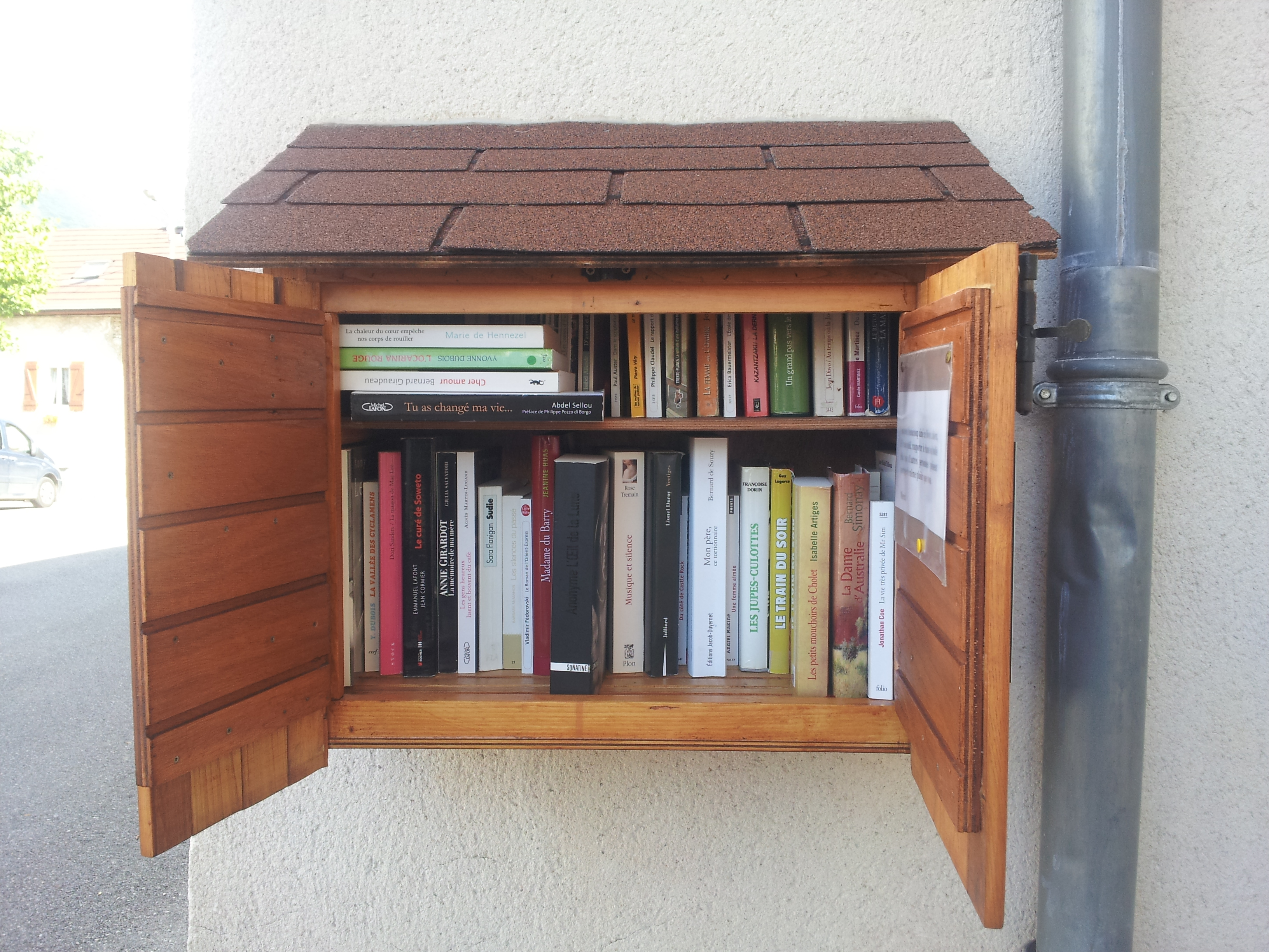 Boîte à livres ou microbibliothèque située à Saint-Germain-les-Paroisses dans l'Ain